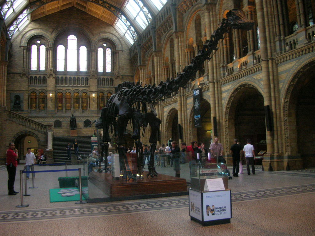 البهو الرئيسى لمتحف التاريخ الطبيعى